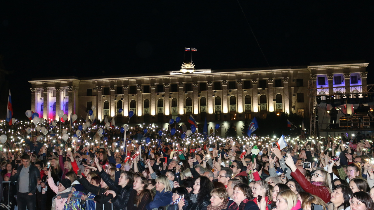 Concert «Crimean spring. Five years in his native Harbor»